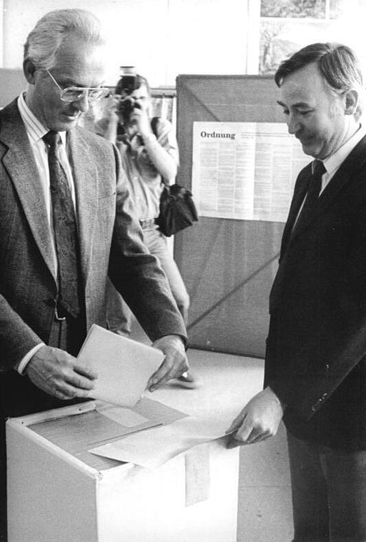 Leipzig, Kommunalwahl, Hinrich Lehmann-Grube ADN-Gahlbeck 6.5.90 Leipzig: Kommunalwahl. Dr. Hinrich Lehmann-Grube, Spitzenkandidat der SPD für das Amt des Oberbürgermeisters, ist seit dem 4.4. Staatsbürger der DDR. Der Politiker aus Hannover wählte in Leipzig-Schönefeld. Abgebildete Personen: Lehmann-Grube, Hinrich Dr.: 1990 Oberbürgermeister von Leipzig, SPD, Bundesrepublik Deutschland